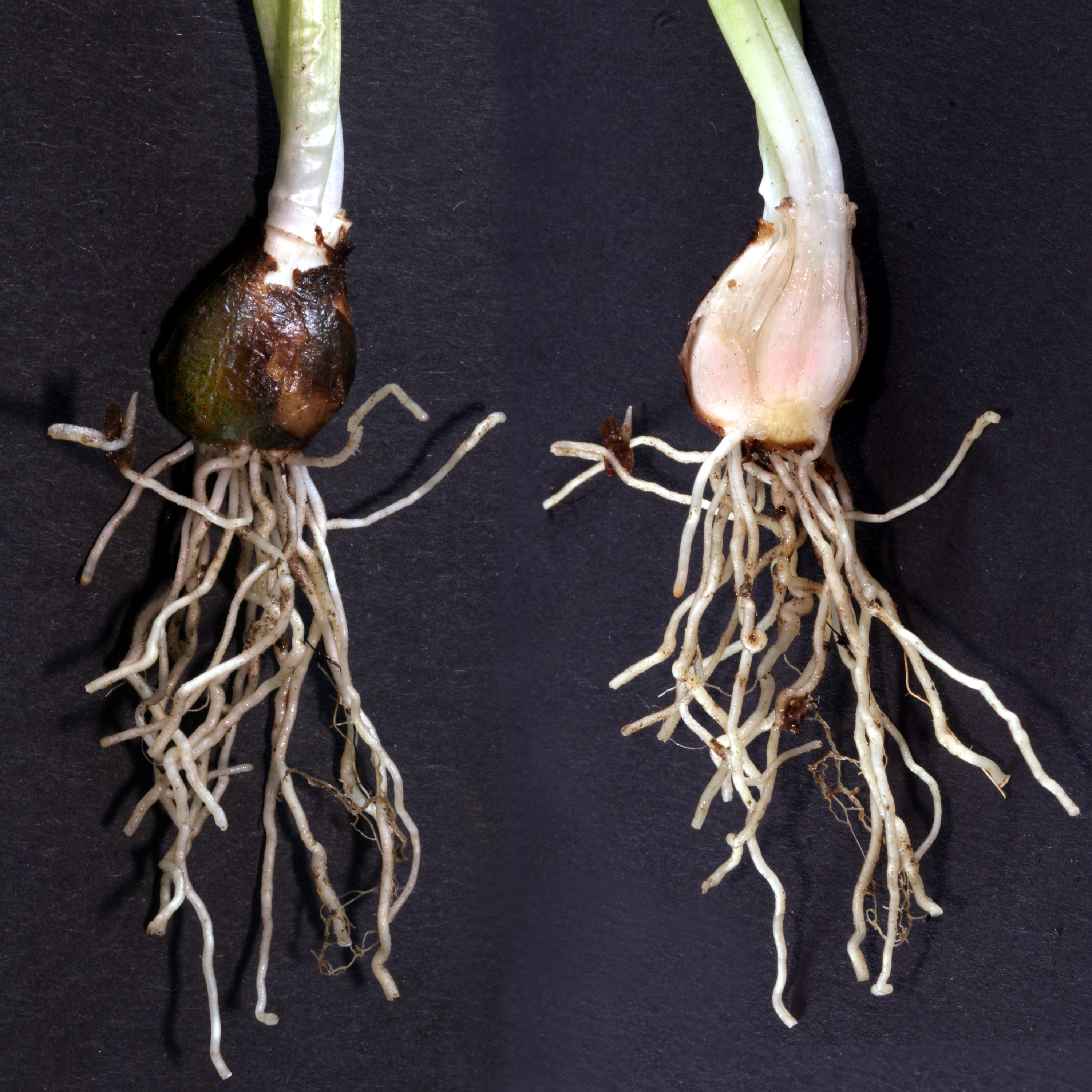 Knolle des Kleinen Schneeglöckchens (Galanthus_nivalis). Rechts im Schnitt die Zwiebelstruktur der Knolle